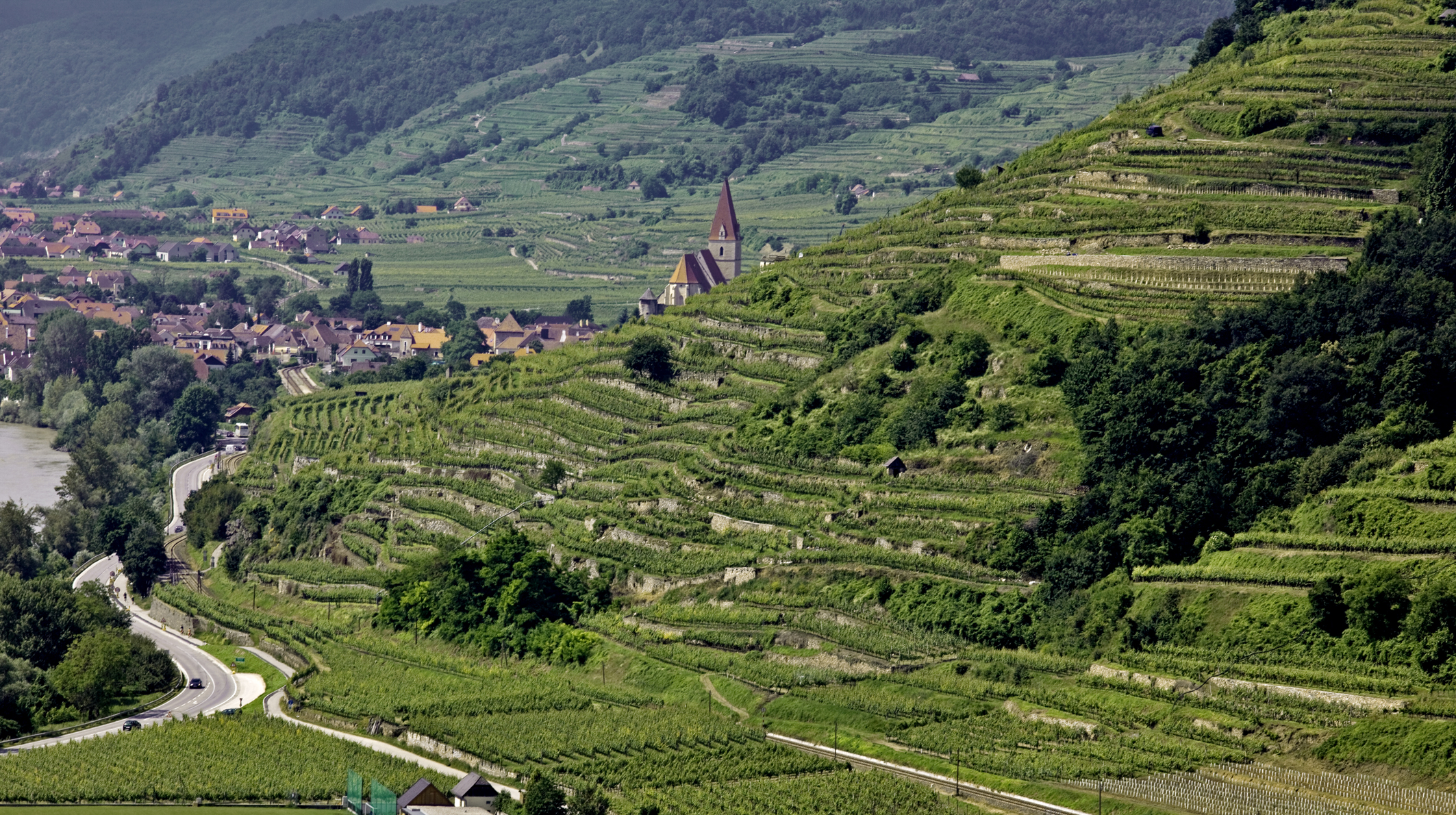 Weingartenlage Klaus in Weißenkirchen in der Wachau